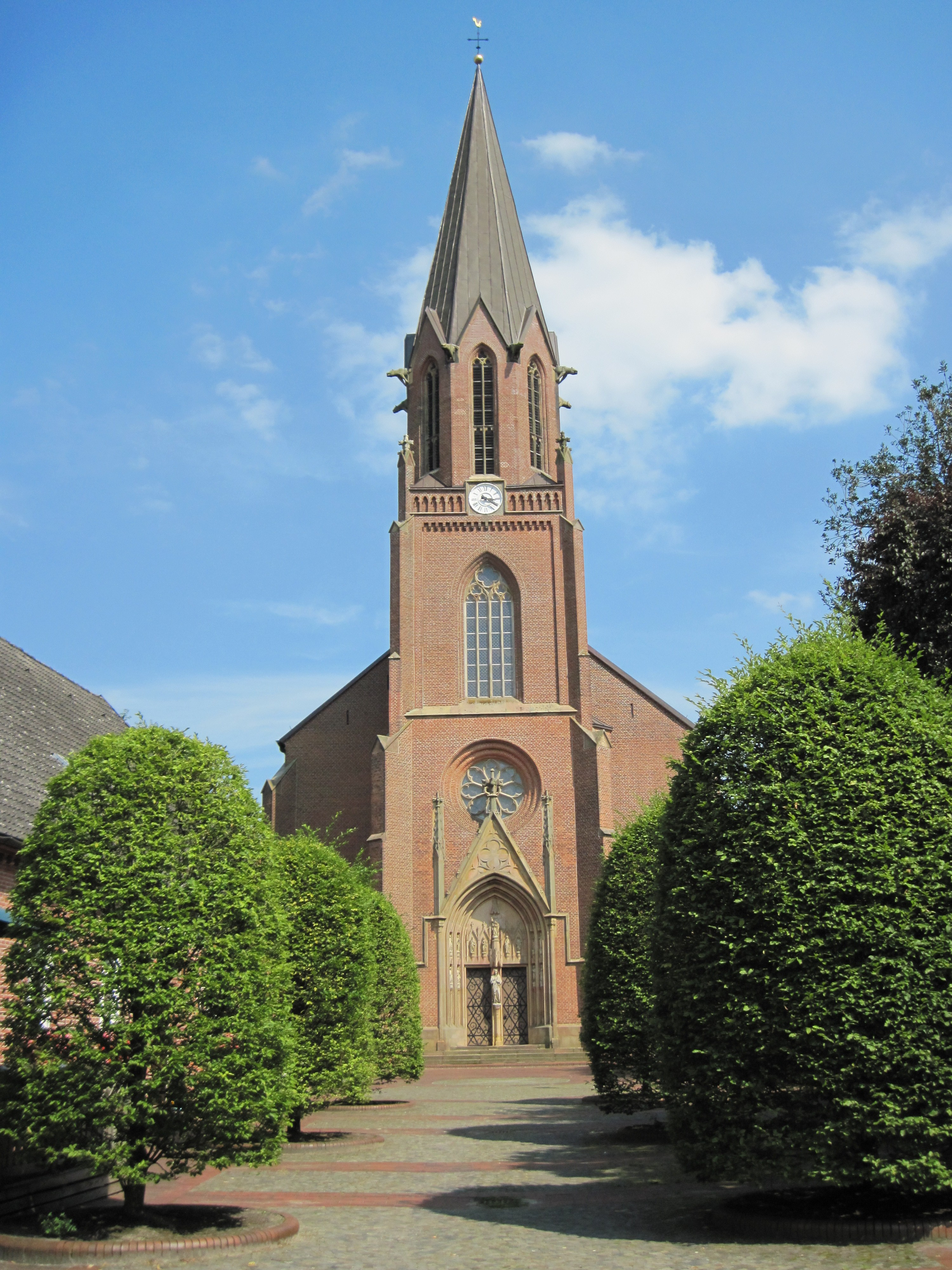 Kath. Kirche St. Katharina von Siena in Lindern (Oldenburg)